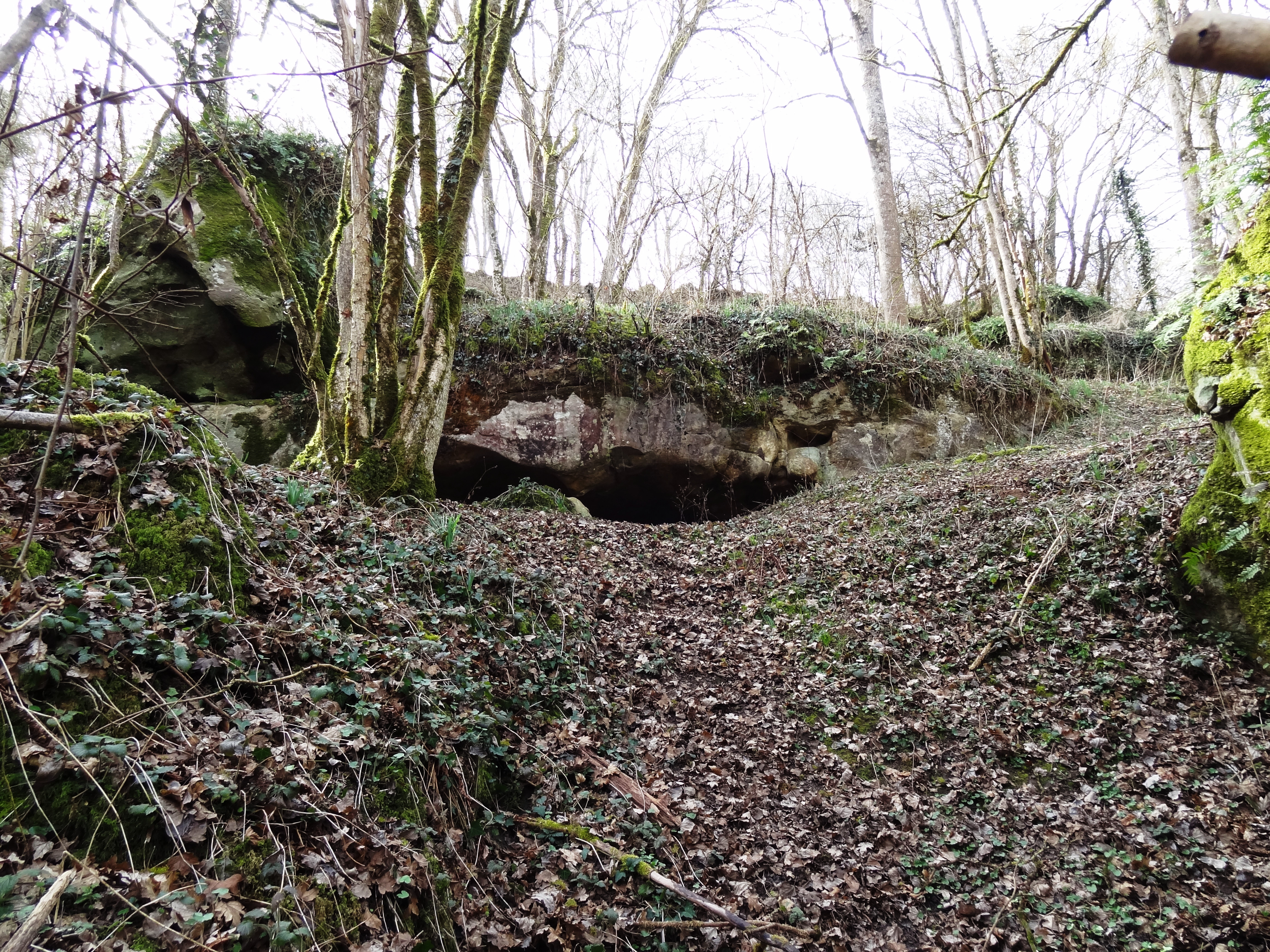 La grotte de Prinvaux est une grotte ornée située sur la commune de Boigneville dans l'Essonne, en France.